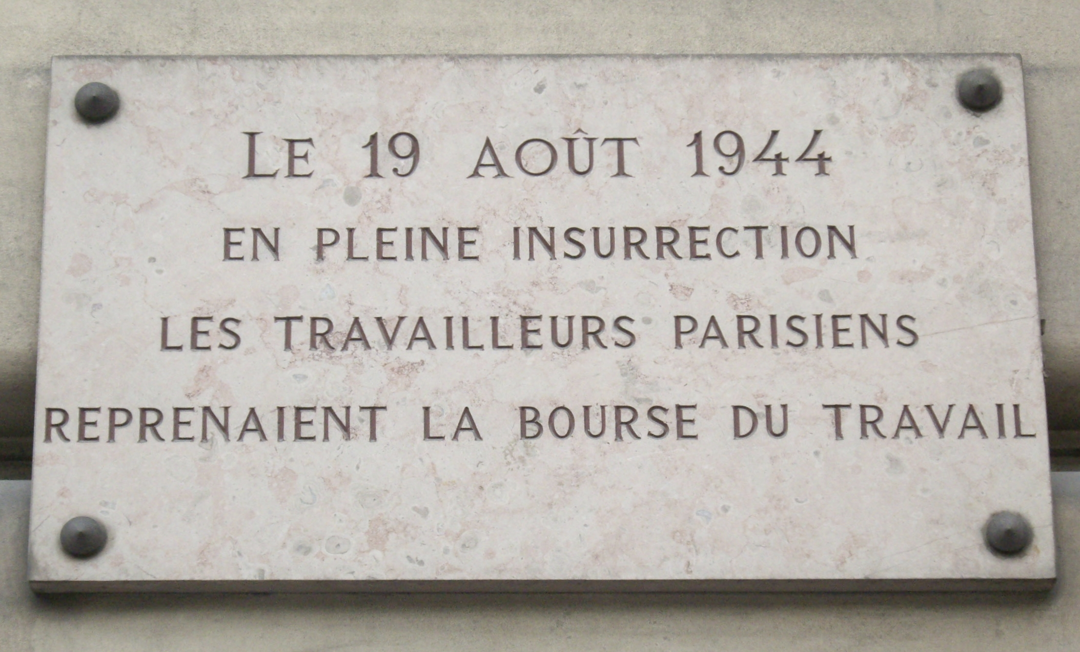 Plaque apposée sur la façade de la Bourse du travail, au n° 3 de la rue du Château-d'Eau, Paris 10e. « Le 19 août 1944, en pleine insurrection, les travailleurs parisiens reprenaient la Bourse du travail. »